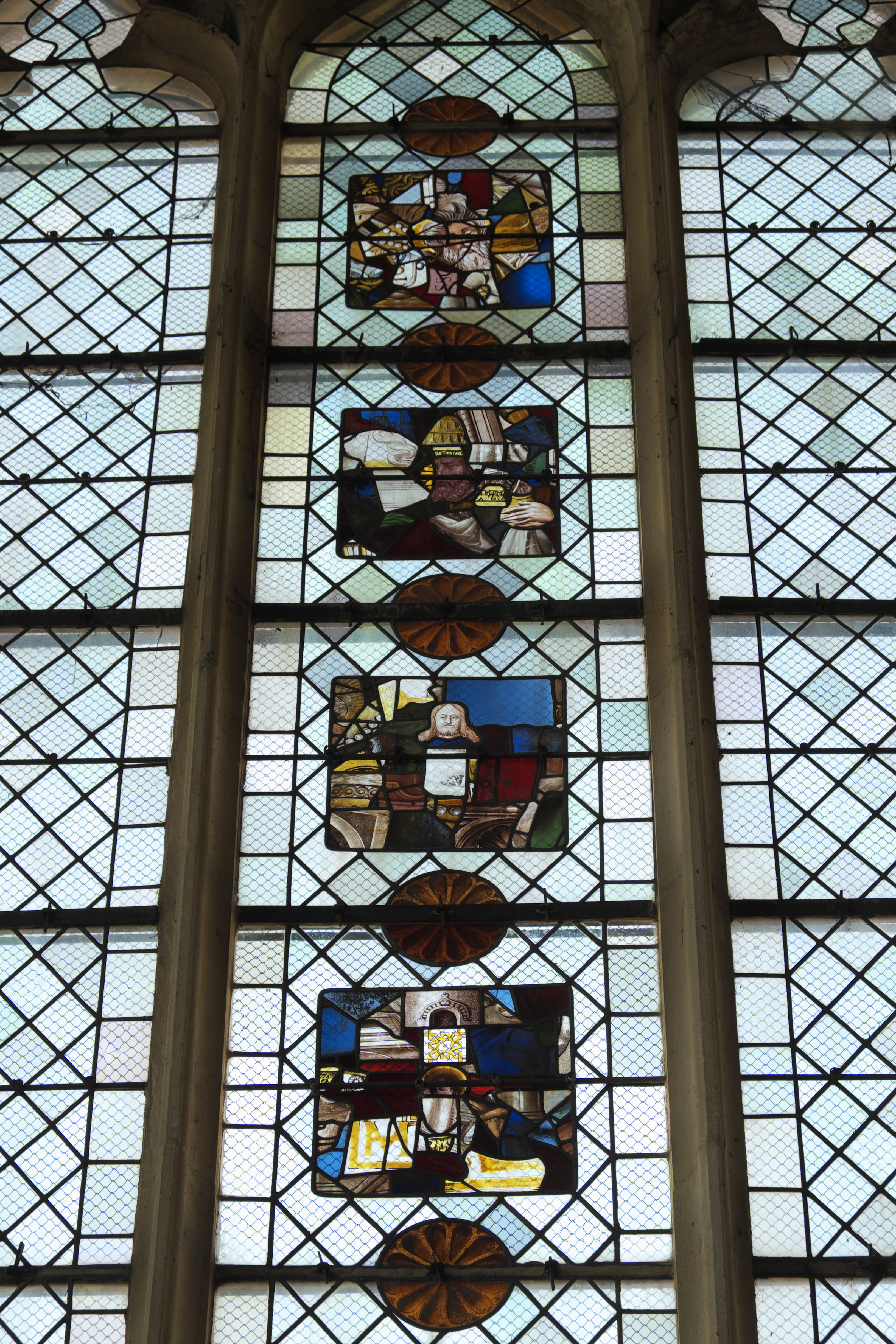 Katholische Pfarrkirche Saint-Jacques-le-Majeur et Saint-Christophe in Houdan im Département Yvelines (Île-de-France/Frankreich), Bleiglasfenster mit Fragmenten aus dem 16. Jahrhundert